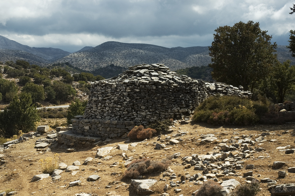 Nida Plateau - Mitata